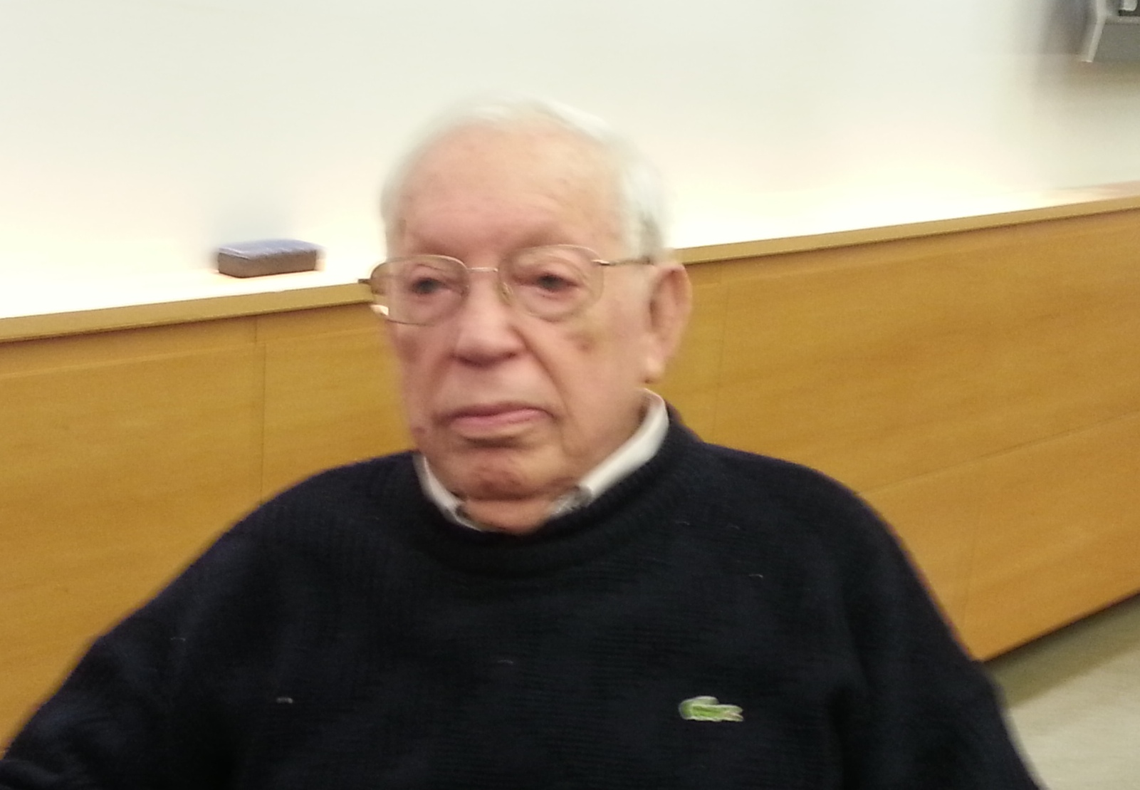 יוסף אבירם הוא ארכאולוג ישראלי בכיר וראש החברה לחקירת ארץ ישראל ועתיקותיה.